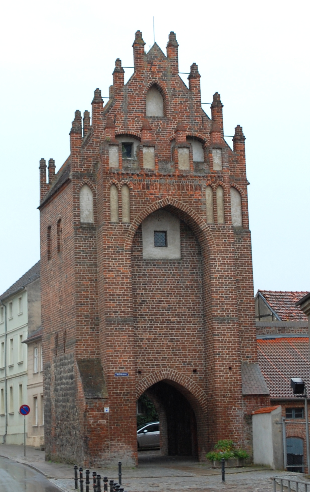 Außenseite Mühlentor Templin